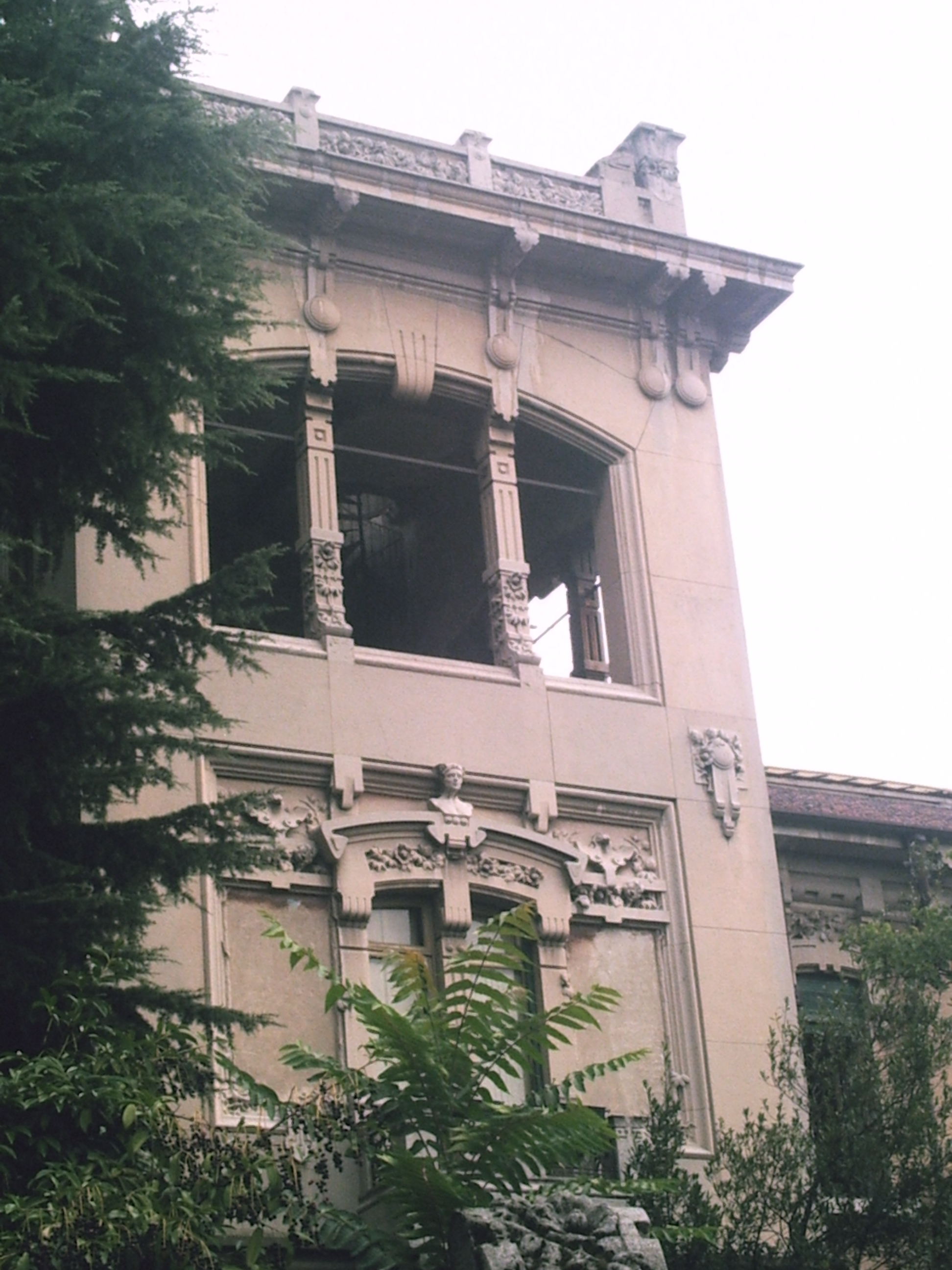 Particolare di Villa Ida Lampugnani Gajo (Parabiago).